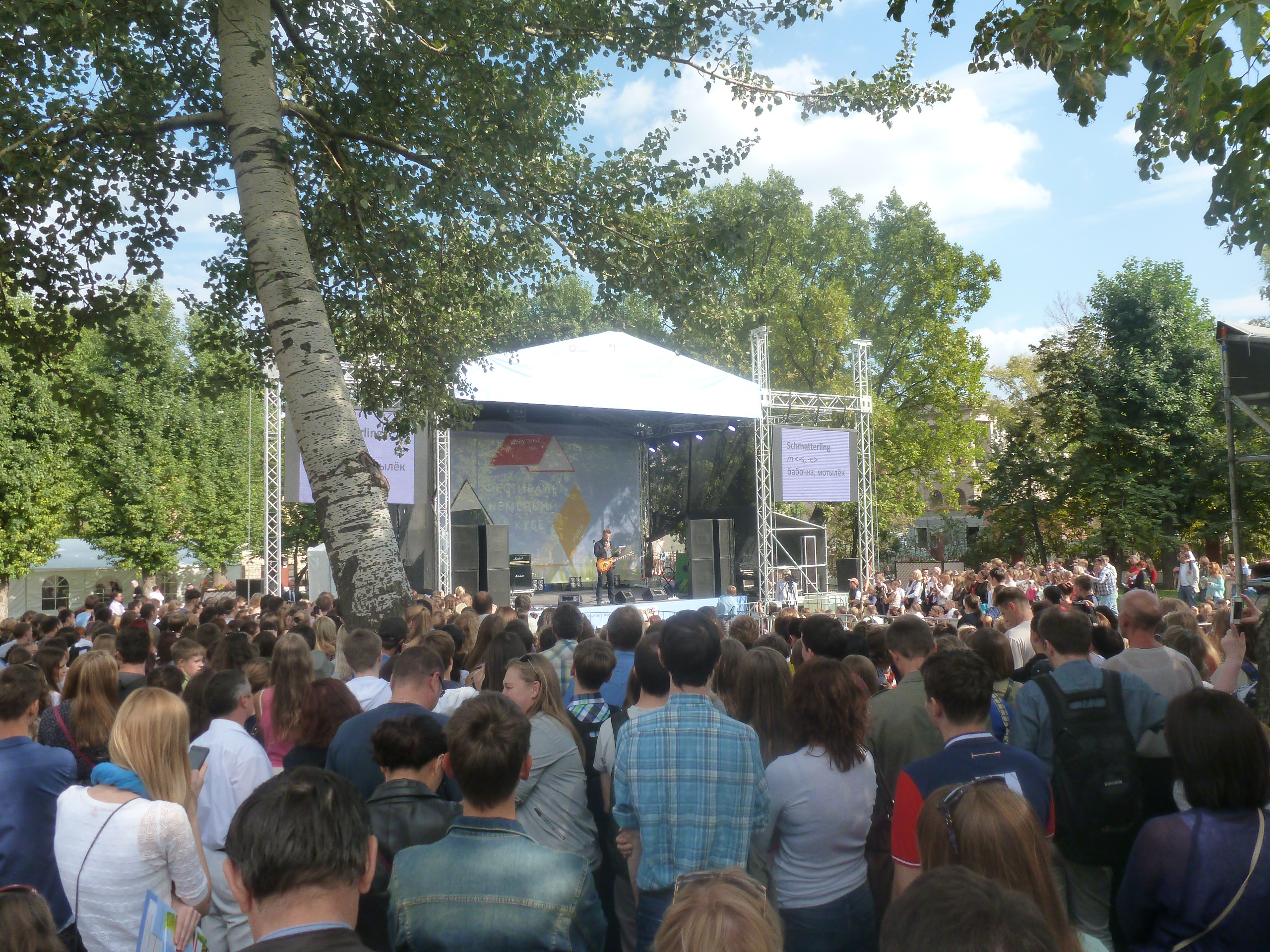 Festivalo de germana lingvo en Moskvo, Rusio, en jaro 2014.